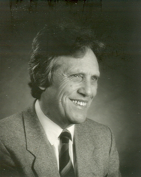 Prtrait von Otto Amann, Buergermeister von Hohenems 1965 - 1990